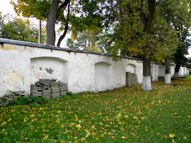 Нясвіж. Былы кляштар бенедыкцінак